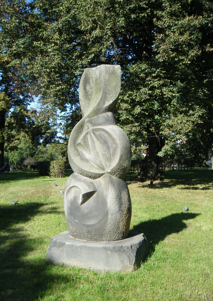 Rzeźba Warszawska Jesień w pobliżu Uniwersytetu Muzycznego im. Fryderyka Chopina w Warszawie na skwerze Bohdana Wodiczki. Wykonana w 1975 roku przez Karola Tchorka.